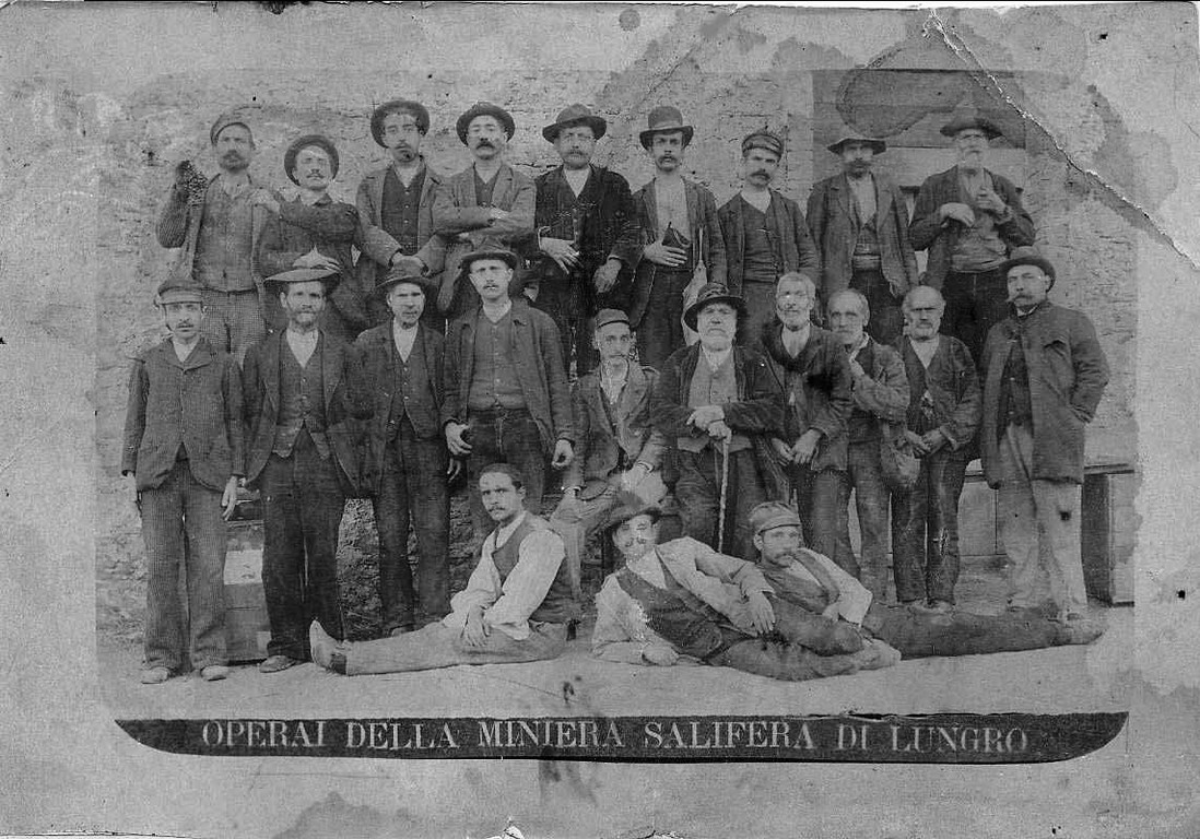 Operai della miniera salifera di Lungro (CS), sec. XX inizio (Comune di Lungro, Archivio storico)